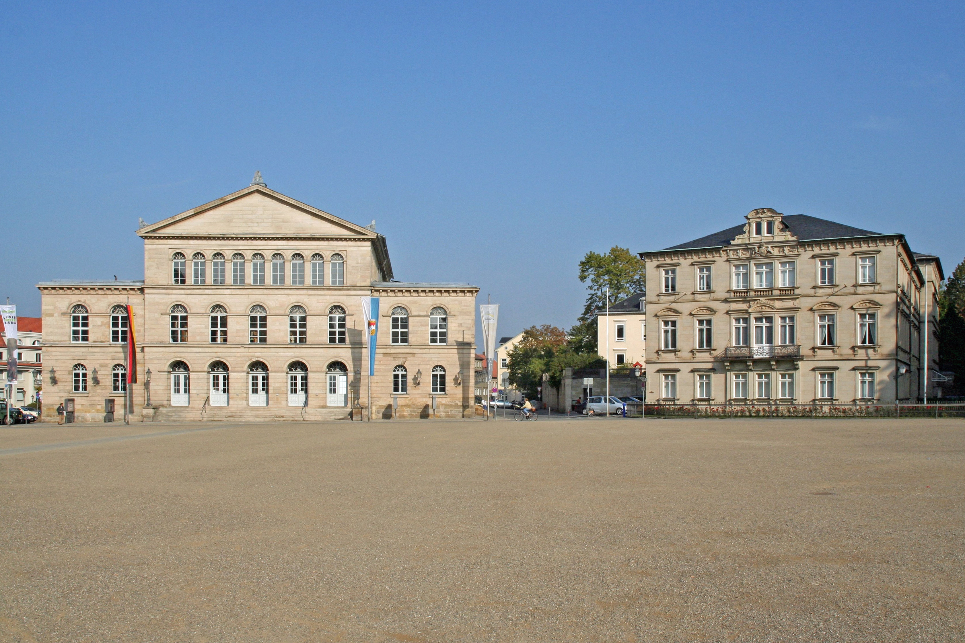 Landestheater und Palais Edinburgh am Schlossplatz, Coburg (Germany)